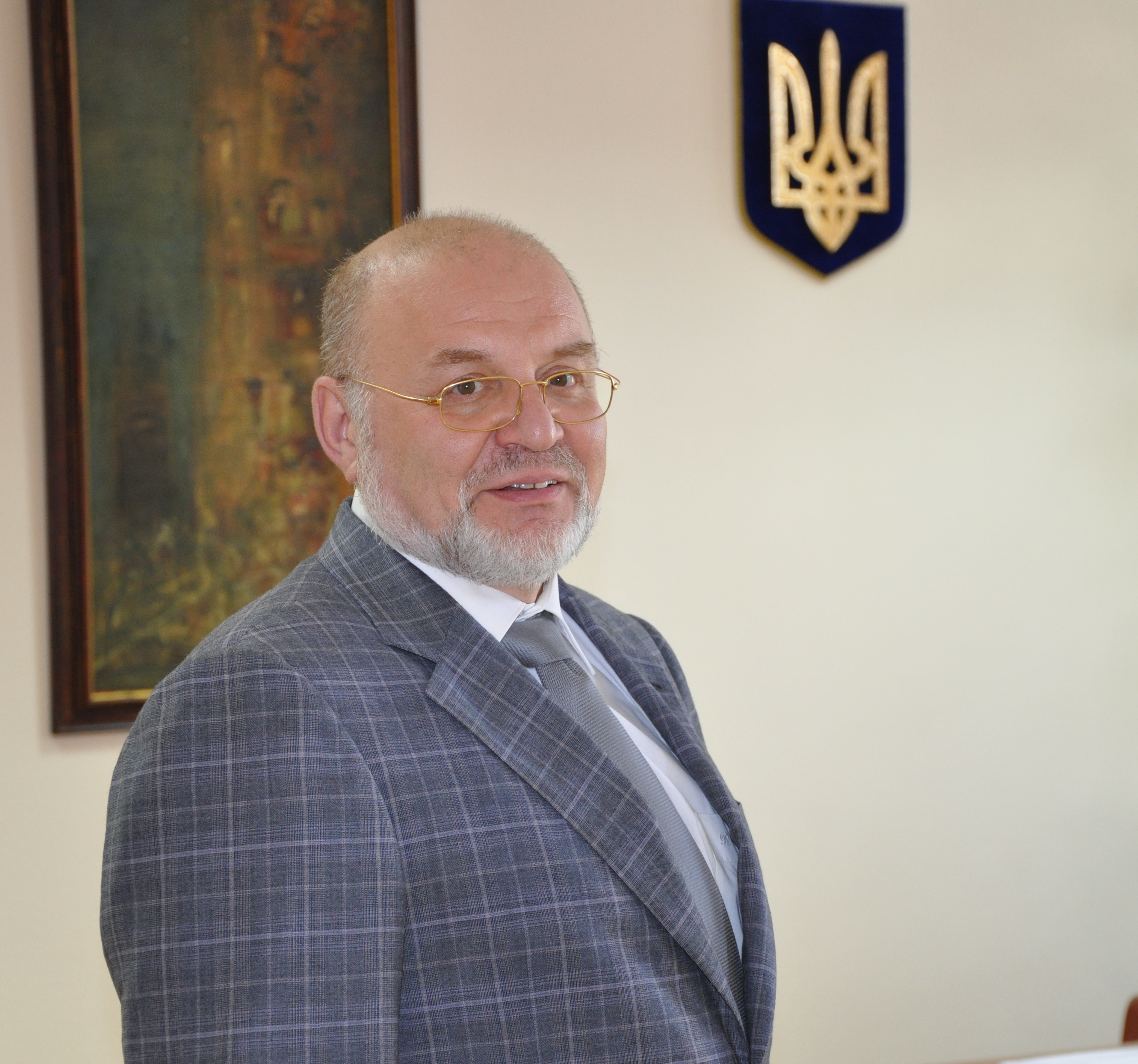 Гринёв Борис Викторович